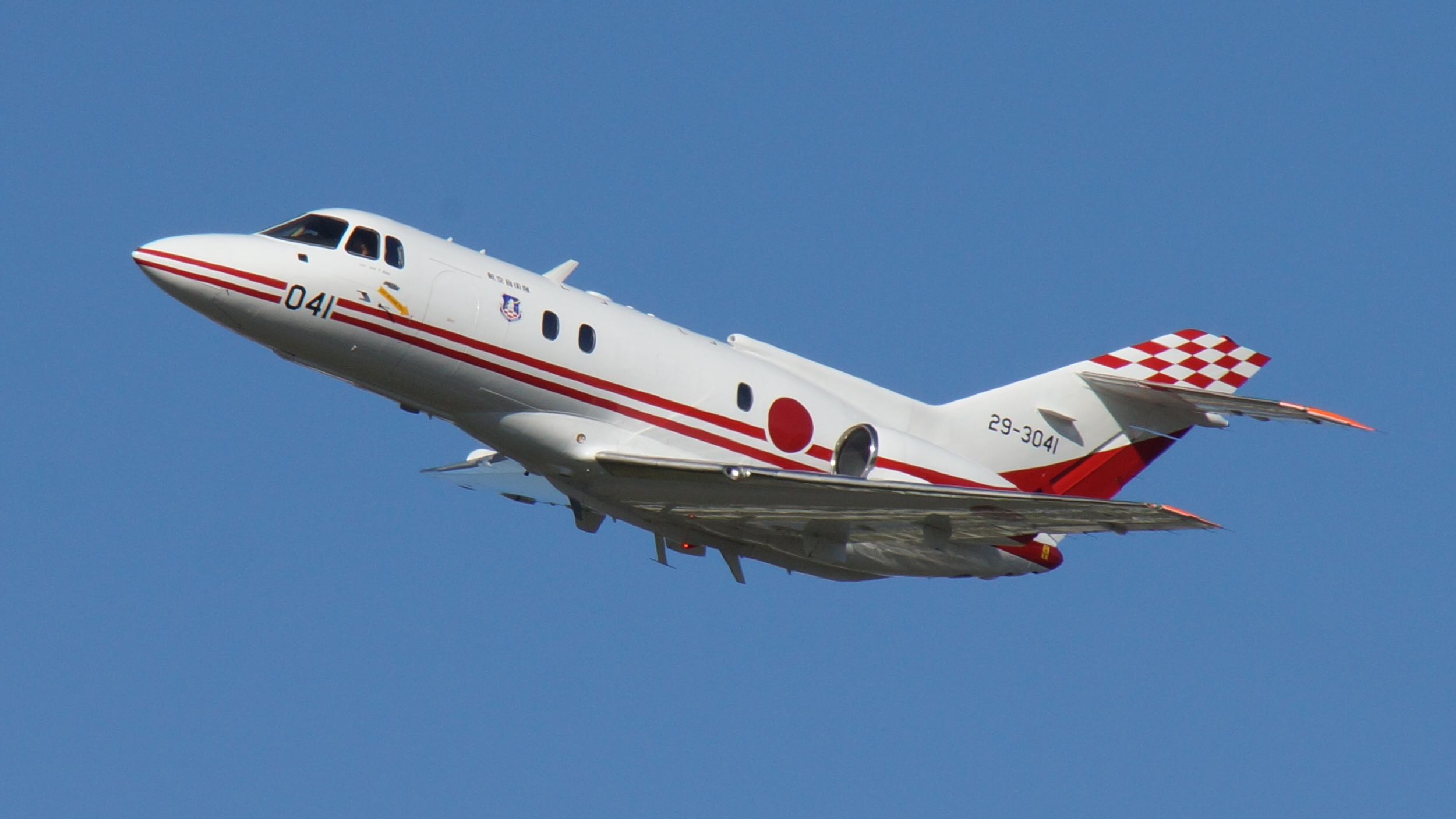 航空自衛隊 飛行するU-125飛行点検機（29-3041号機）。2017年9月30日 海上自衛隊徳島航空基地にて。